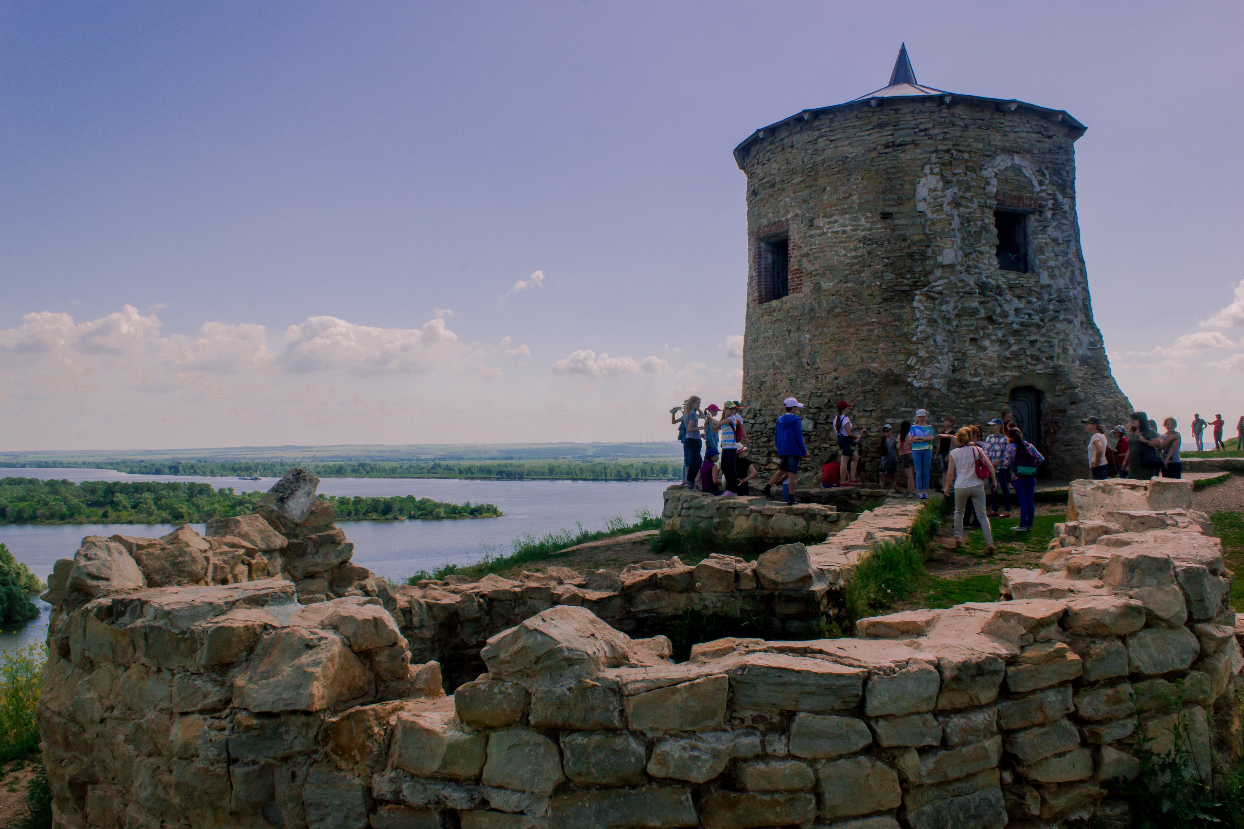 Городище "Чертово": 1 км юго-западнее города, берег р.Тойма, Елабуга, Татарстан